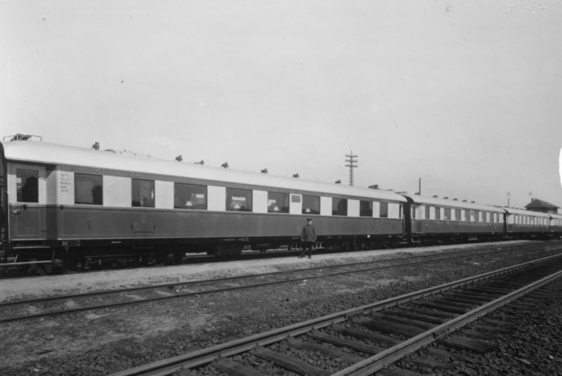 Der Rheingold-Express, welcher zwischen Hoek van Holland, Köln, Basel und Luzern verkehrt, ist jetzt zwei Jahre in Betrieb! Der schönste und schnellste Zug Deutschlands, der Rheingold-Express.